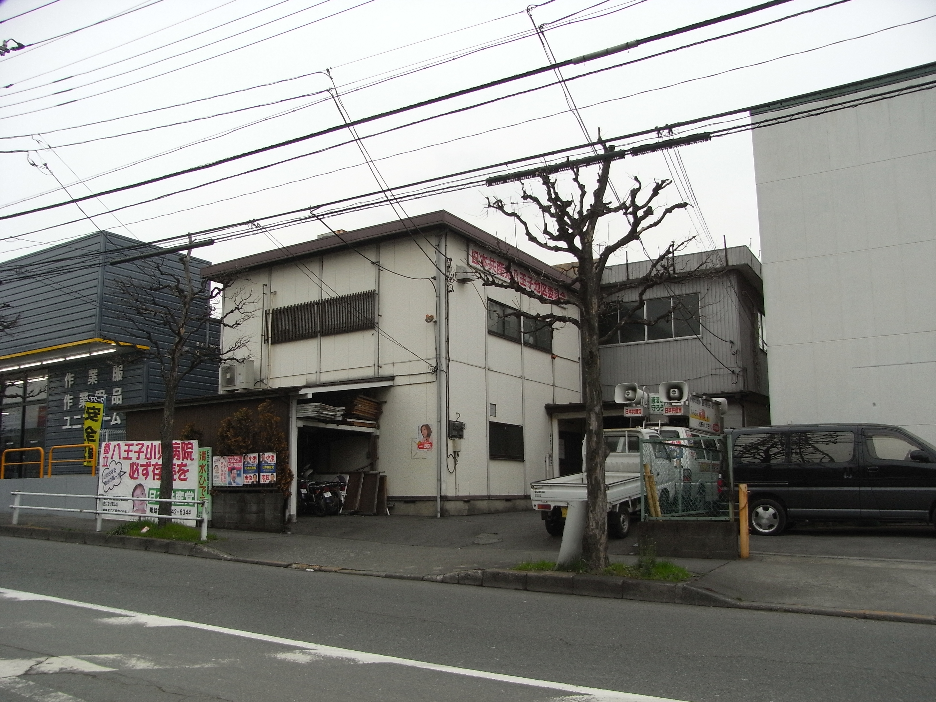 しんぶん赤旗八王子出張所の外観です